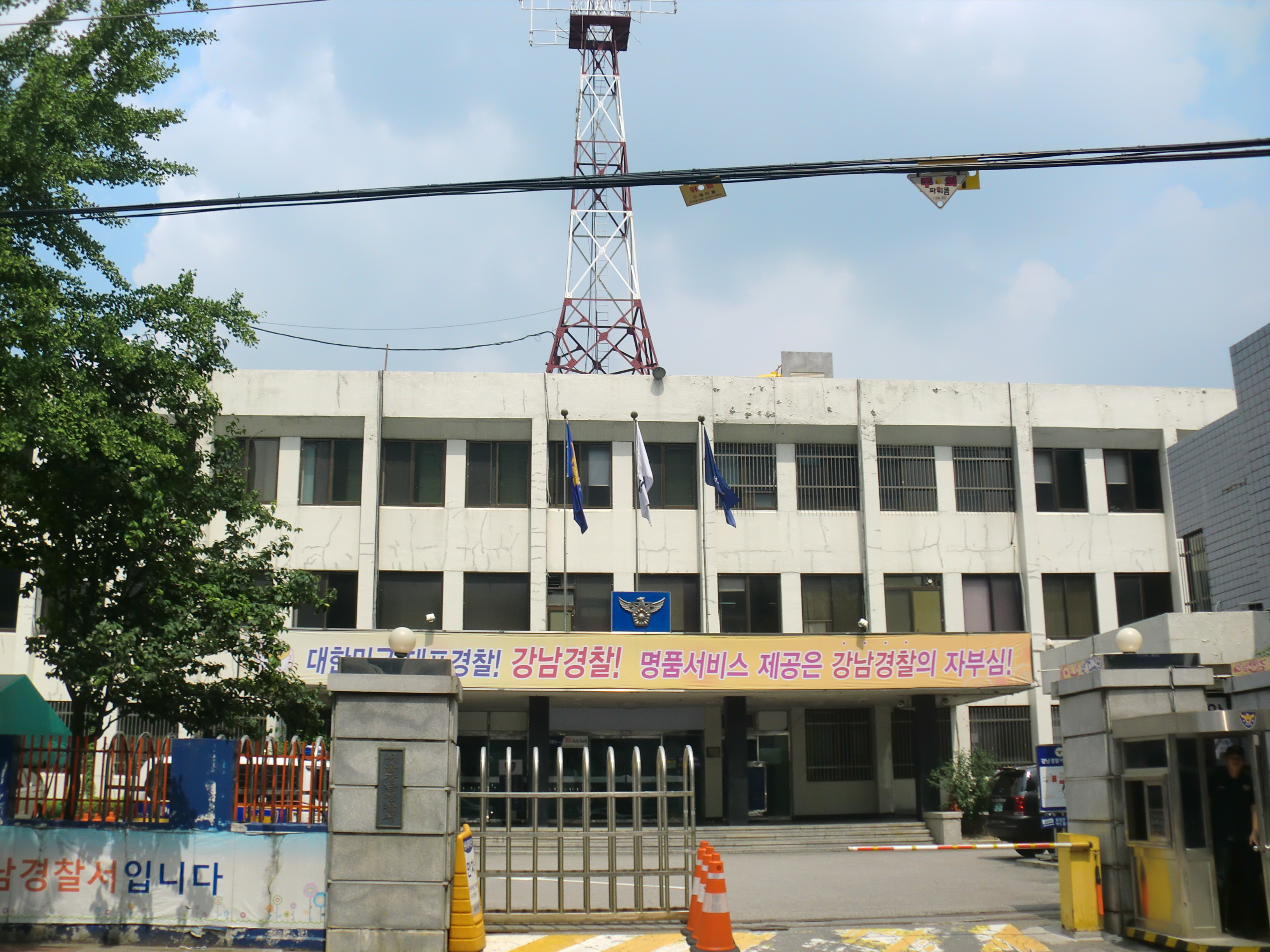 서울특별시 강남구에 있는 서울강남경찰서